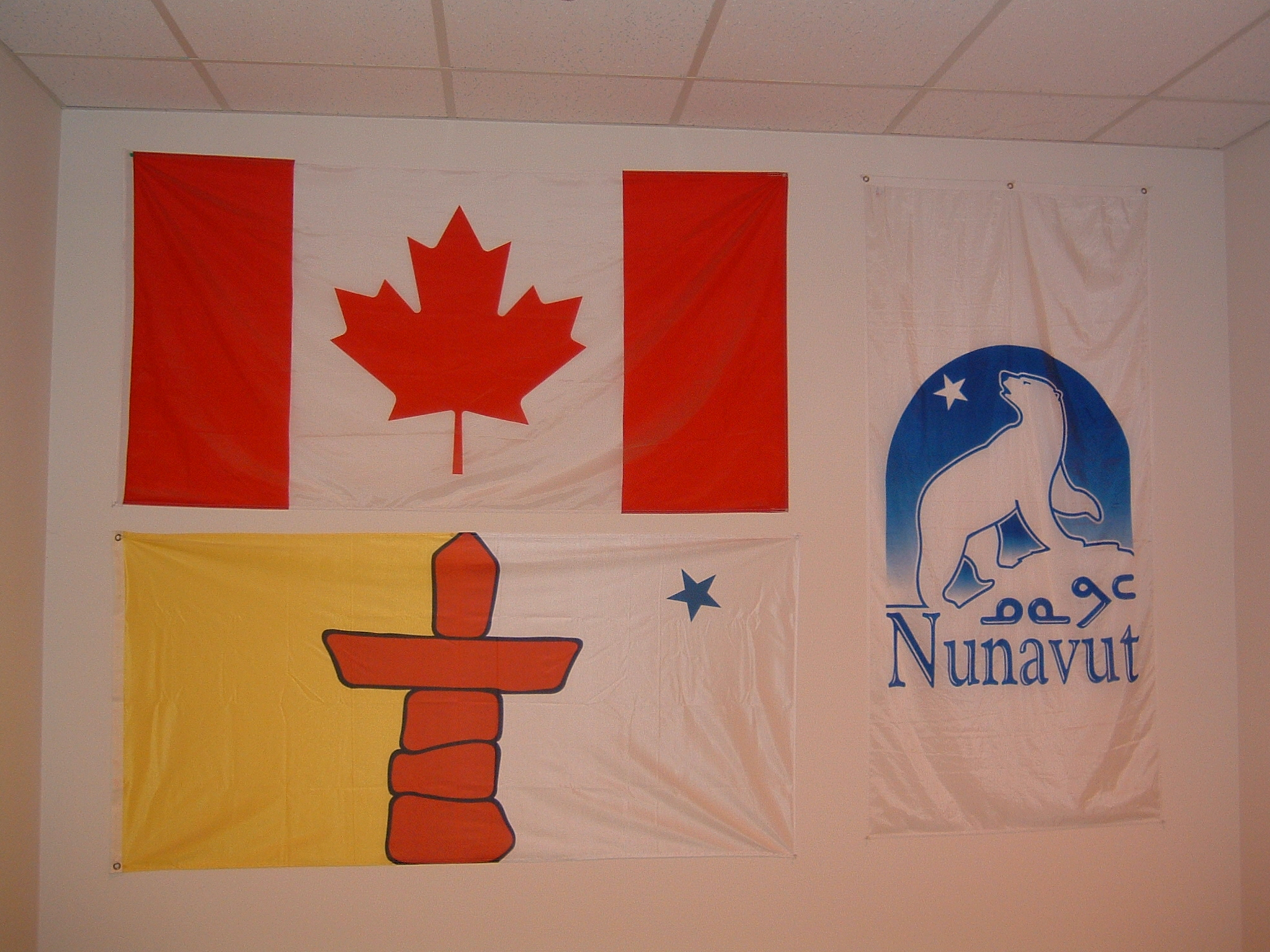 nunavut flags